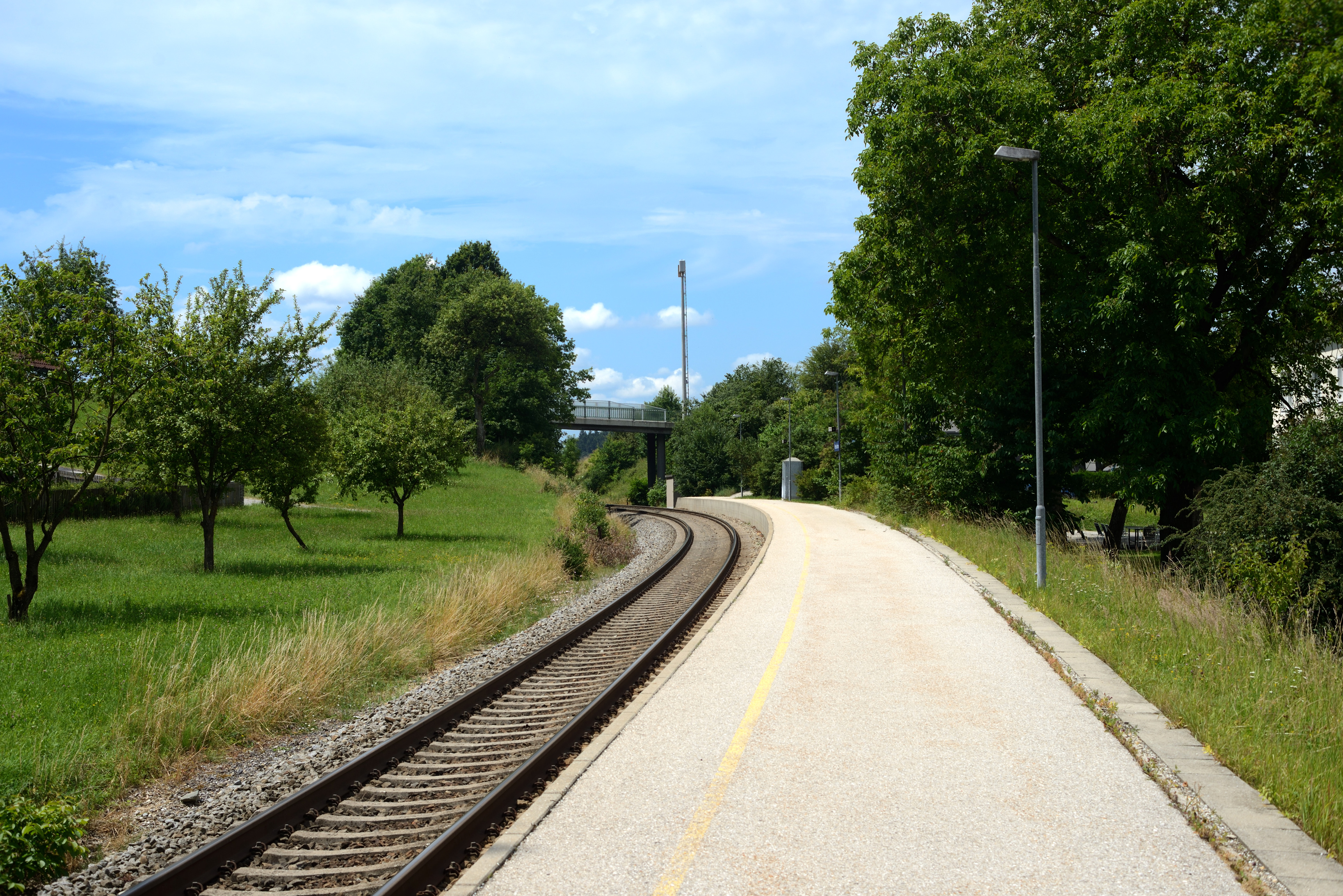 Bahnsteig der Haltestelle Peterskirchen